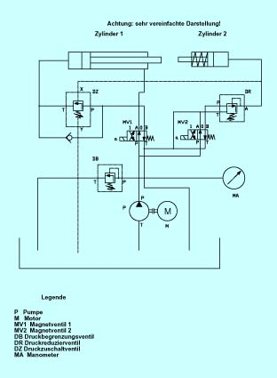 Verwendung Druckventile